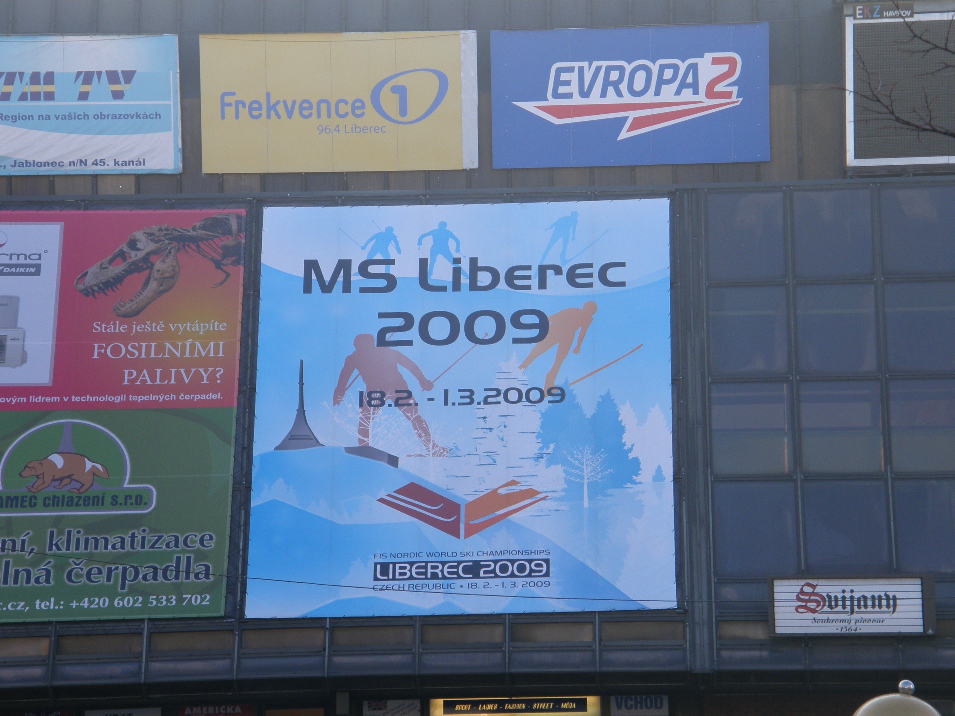 Liberec - plakat z logo mistrzostw świata w narciarstwie klasycznym